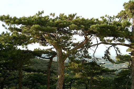 Schirmföhre im Wienerwald (am kleinen Anninger bei Mödling) Foto: selbst fotografiert am 2. 10.04